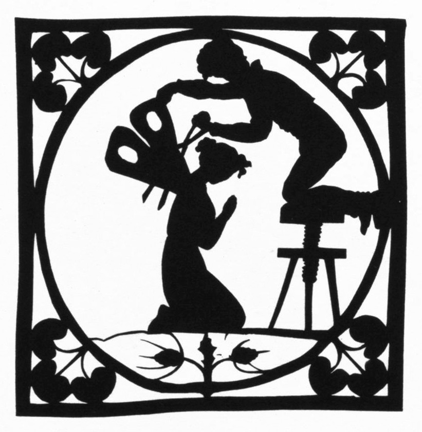 Luise Duttenhofer: Luise Duttenhofer als Psyche, der die Flügel gestutzt werden, schwarzer Scherenschnitt, Entstehungsjahr frühestens 1804, Marbach, Deutsches Literaturarchiv, Inventarnummer 1509.